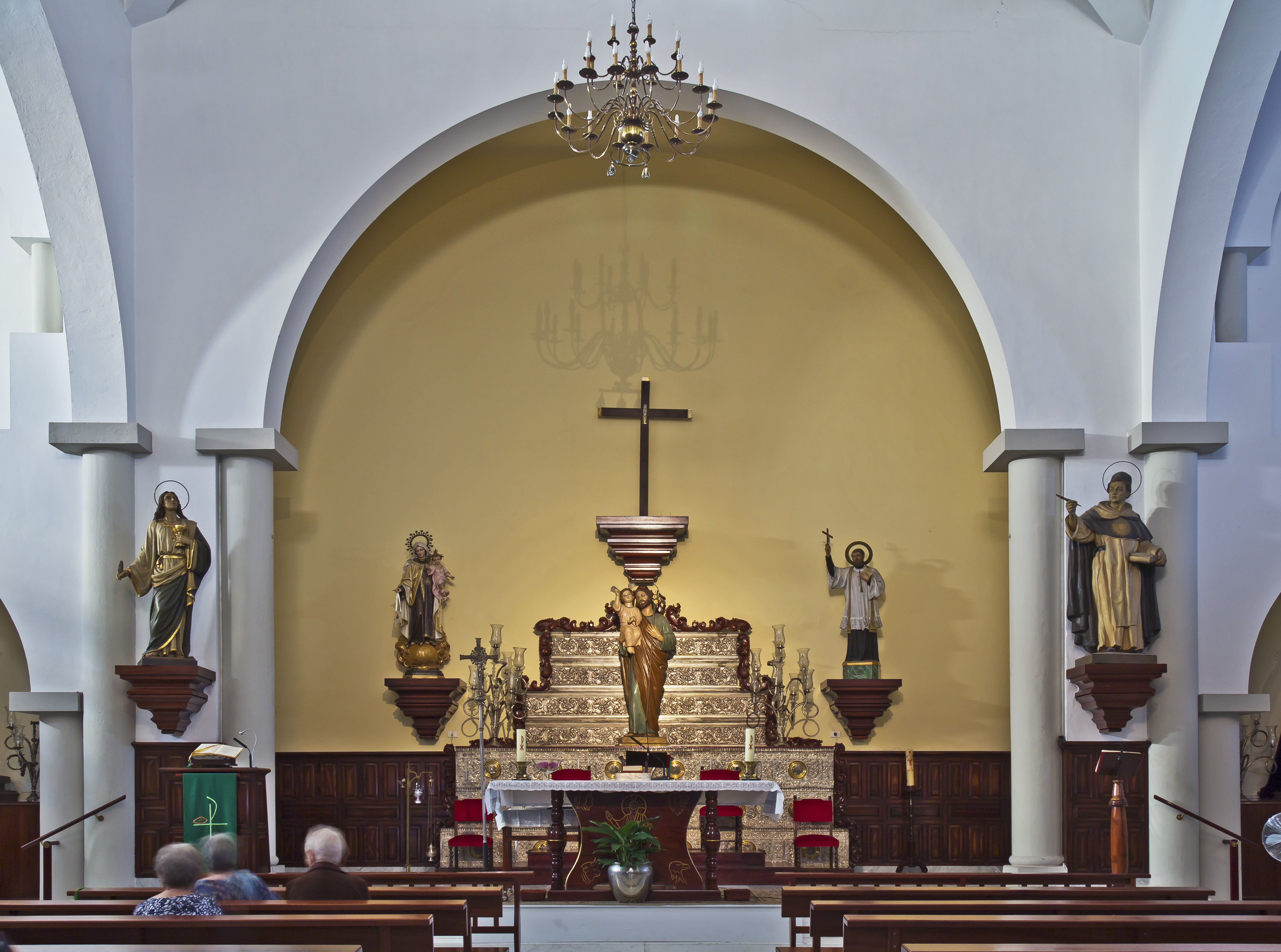 Hauptaltar der Kirche San José. Sie wurde von dem Architekten José Enrique Marrero Regalado geplant. Sie wurde im Jahr 1941 fertiggestellt. Sie befindet sich in der Calle Méndez Nuñez in Santa Cruz de Tenerife.